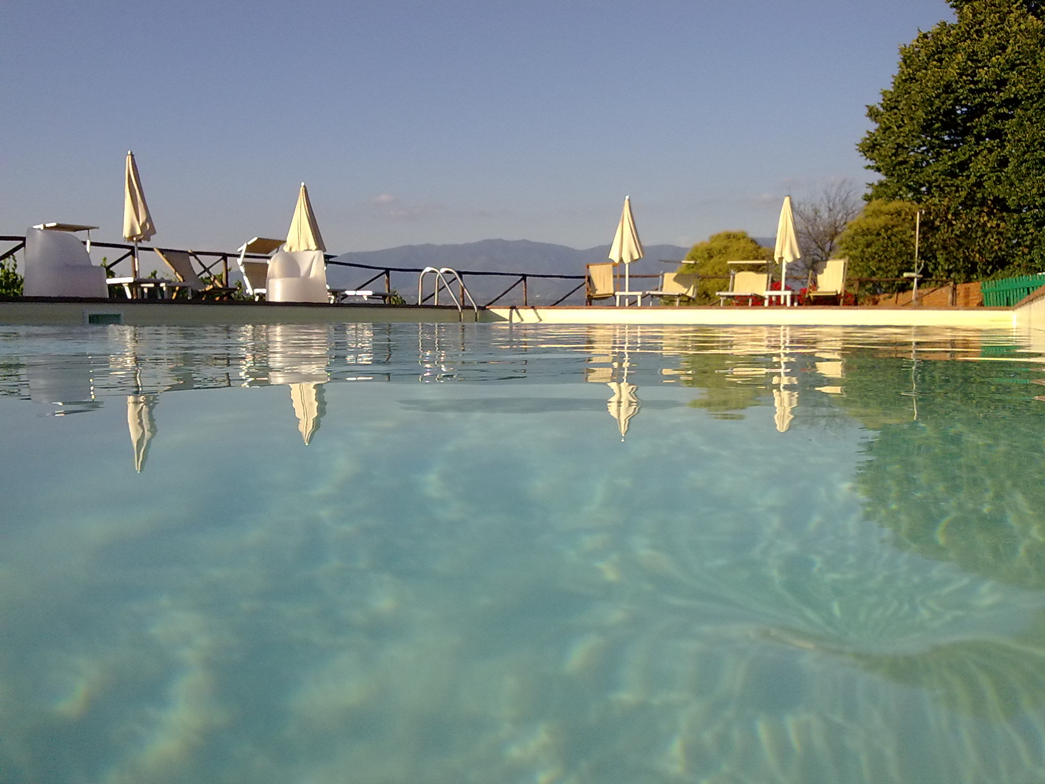 Piscina di Perlamora